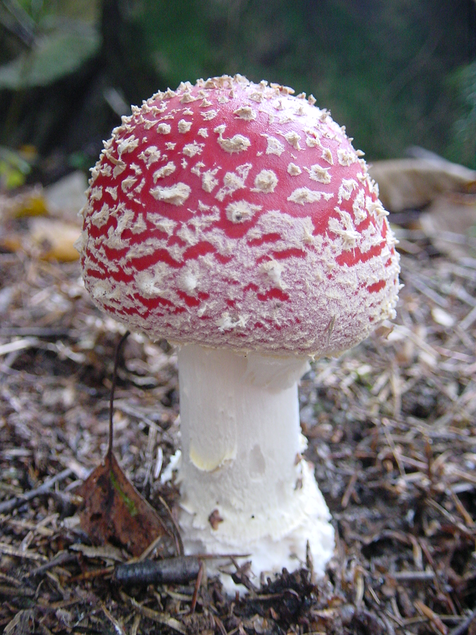 amanite tue mouches